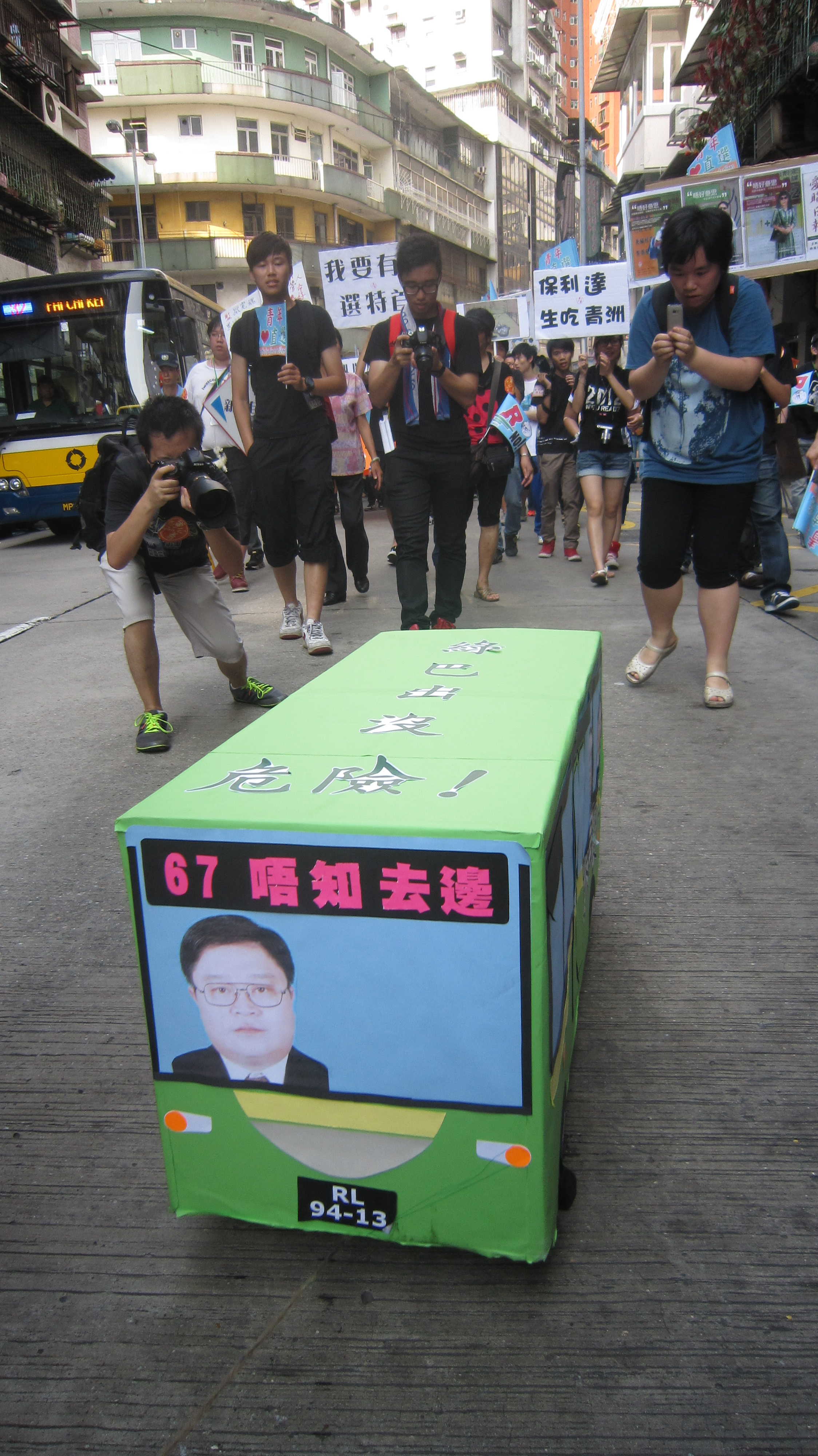 Procissão em 1 de Maio de 2012 em Macau